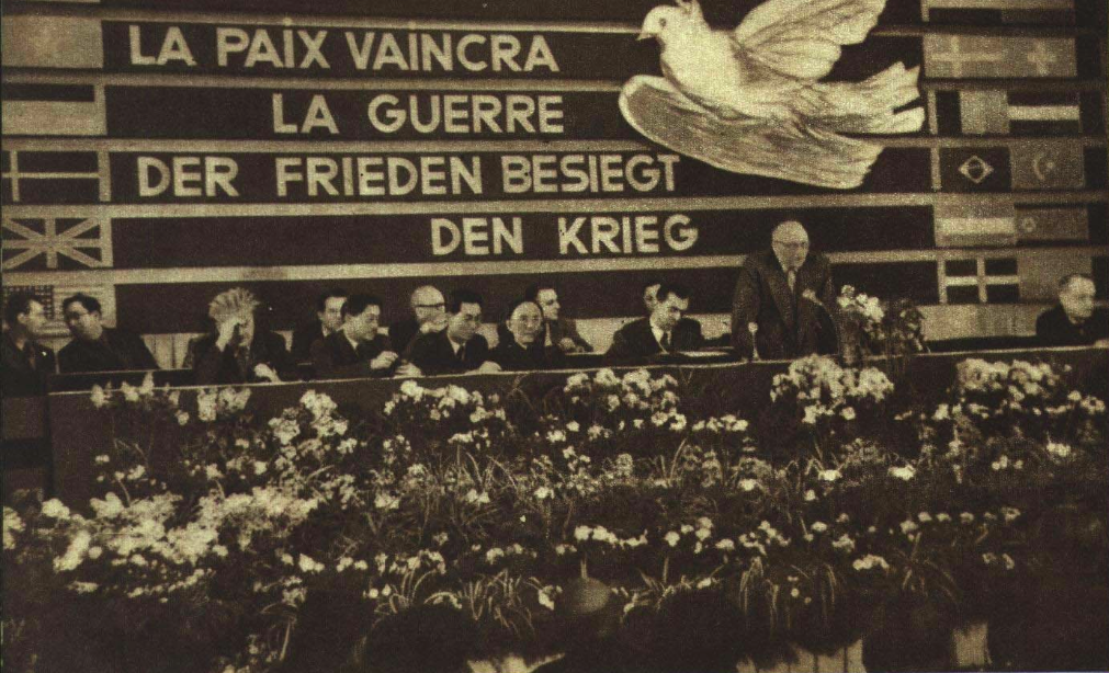 1951年2月21日世界和平理事会 主席会议